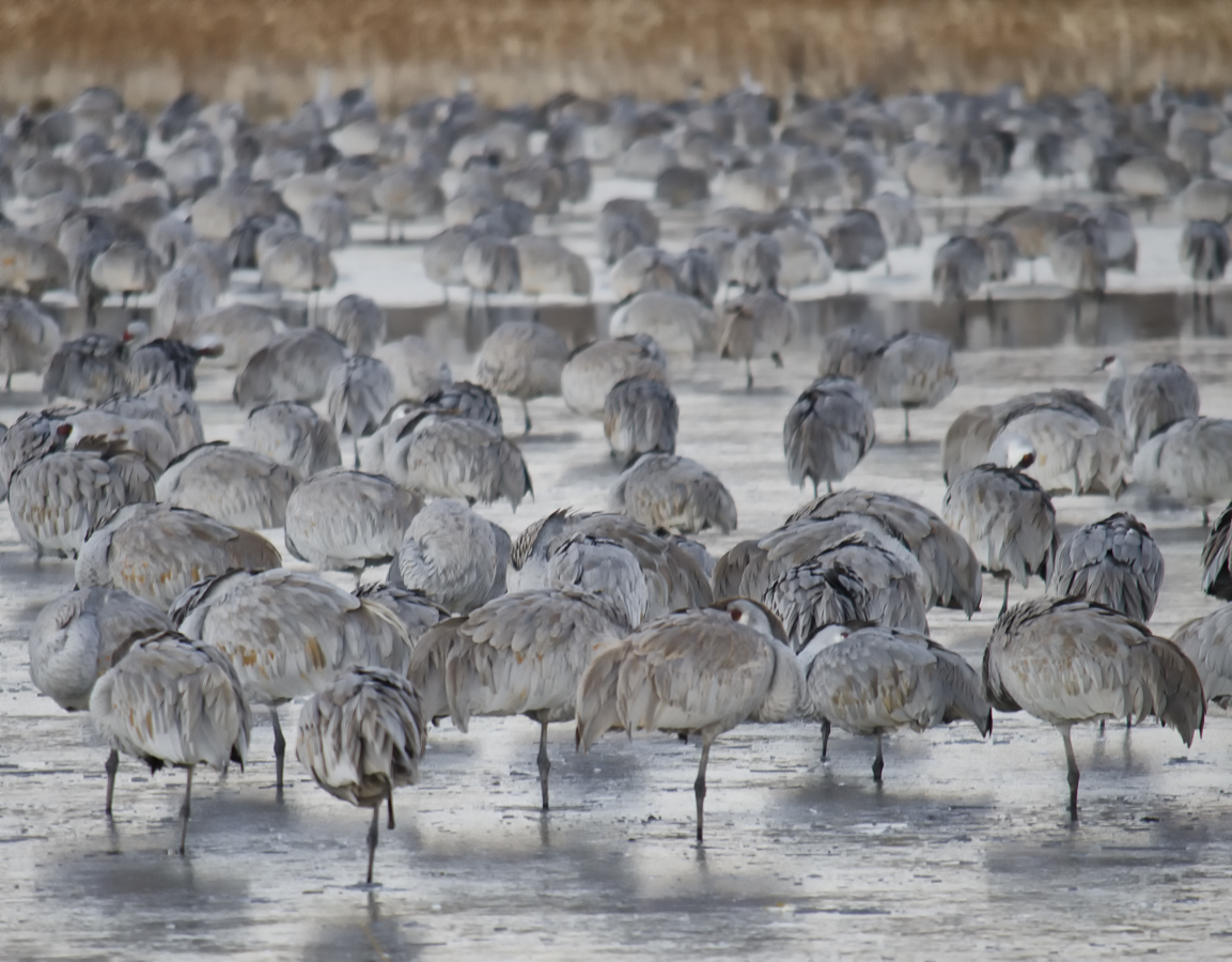 Sandhill Cranes Grus canadensis, Bosque del Apache, New Mexico.